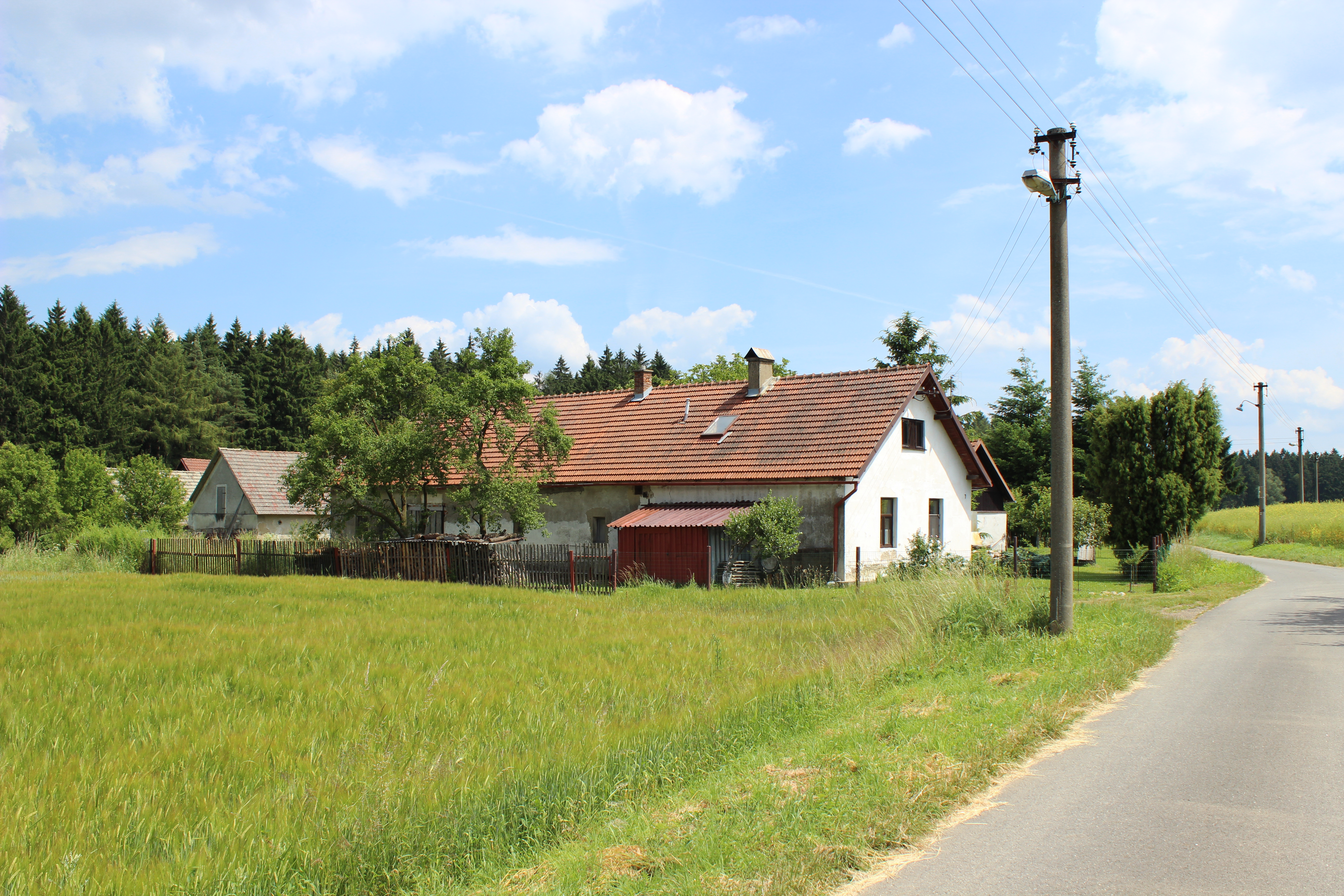 Dům číslo popisné 7 v Krčmách.